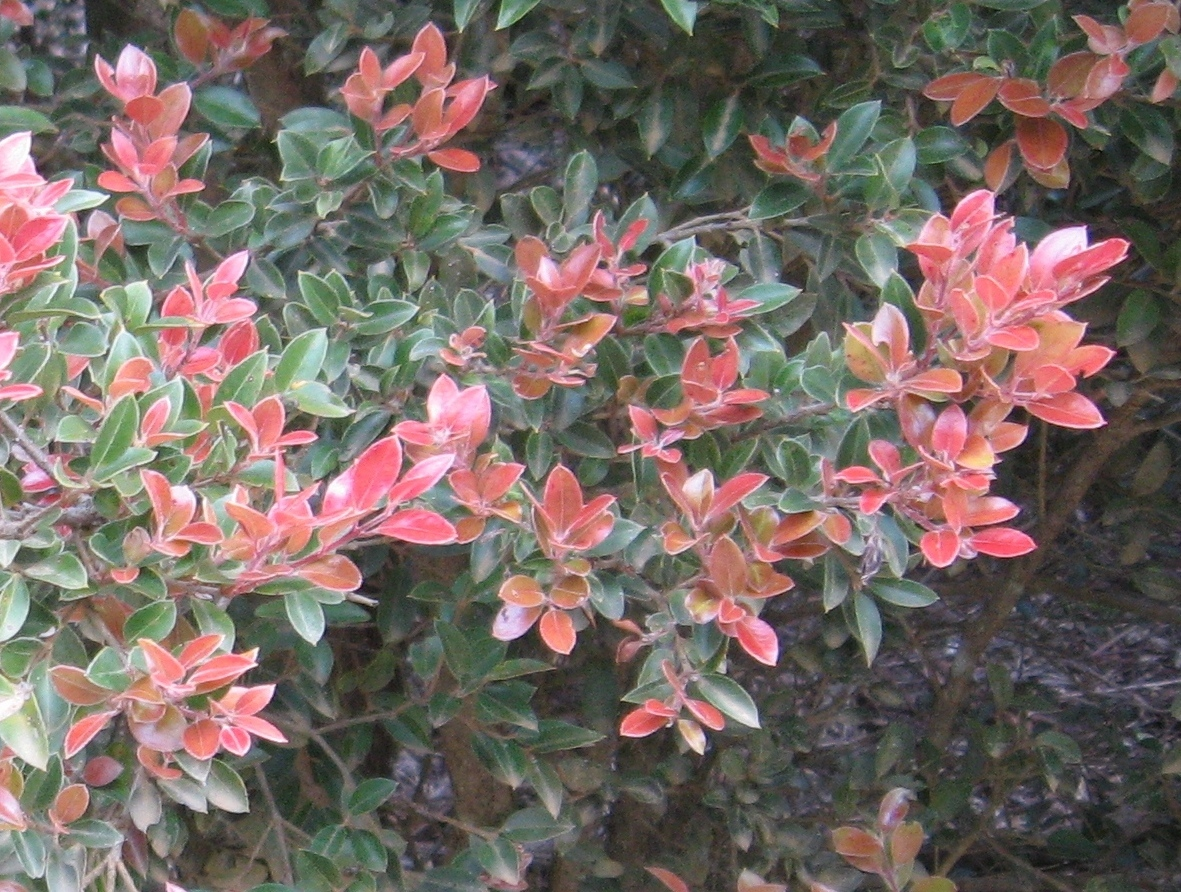 Brotes de luma (Amomyrtus luma) en el parque Oncol, región de Los Ríos, Chile